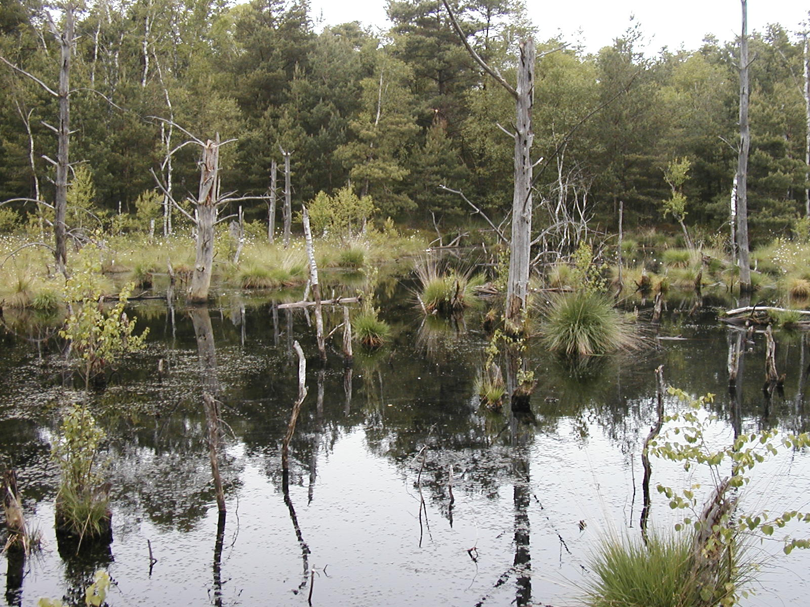 Pietzmoor bei Schneverdingen, Lüneburger Heide